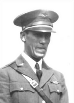 Capitán Emilio Carranza